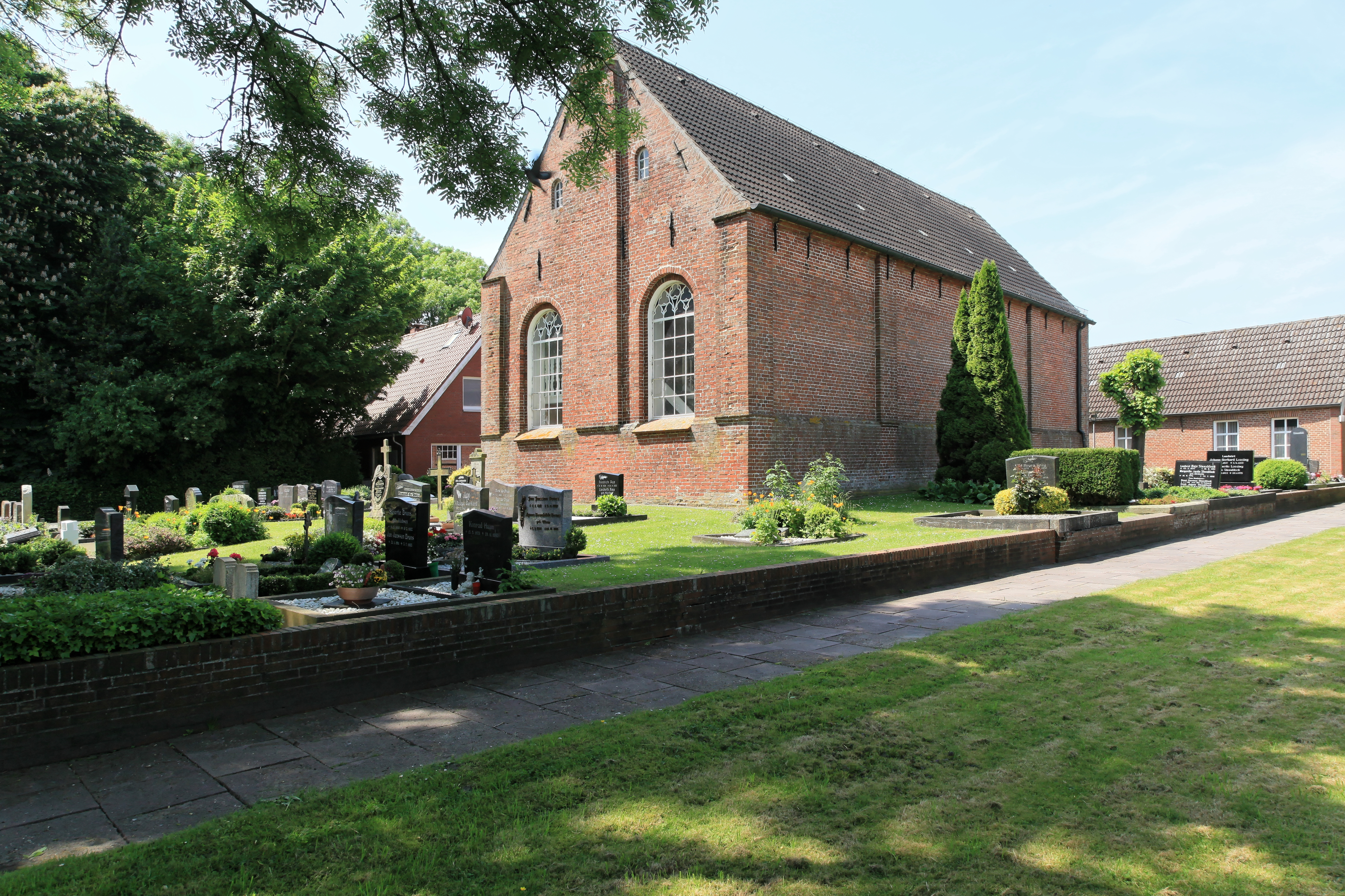 Friedhof an der Pogumer Kirche, Kirchring in Pogum, Jemgum